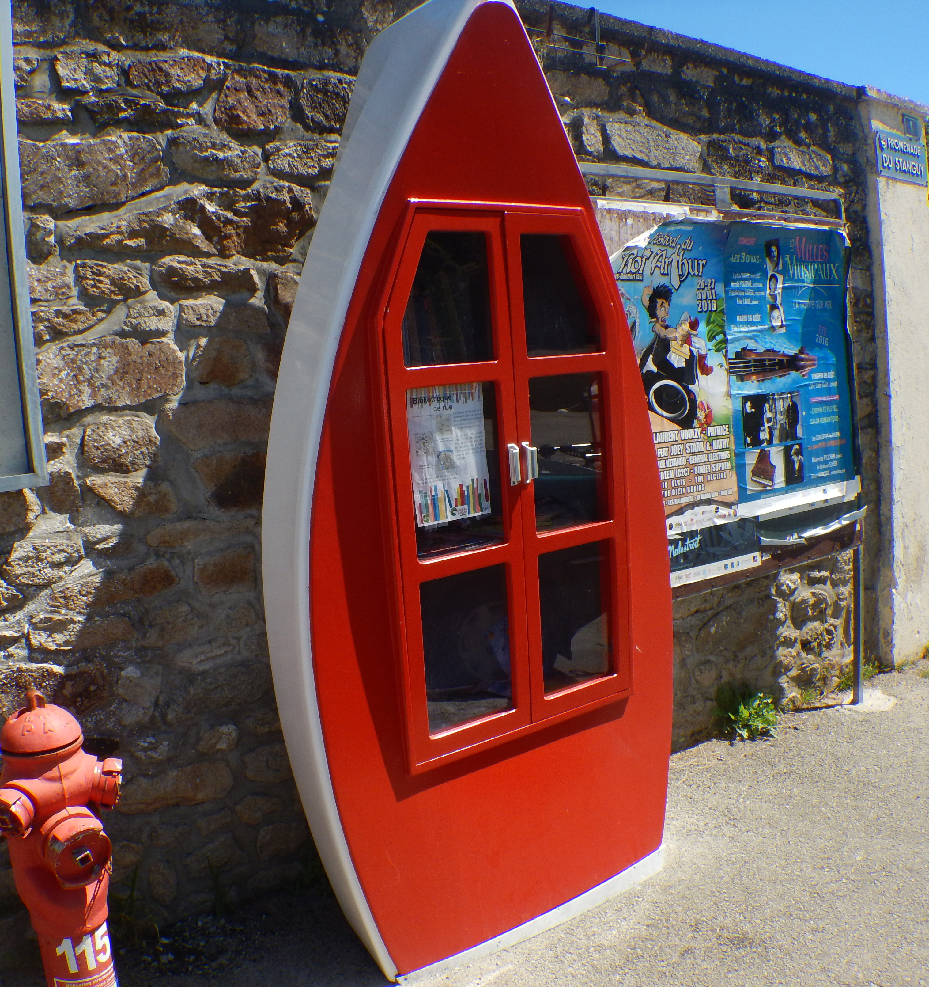 Bibliothèque partagée et gratuite (commun), construite par les élèves d'un lycée pour y entreposer des livres librement apportés et à librement emprunter, sur le Port de Saint-Goustan Auray 2016